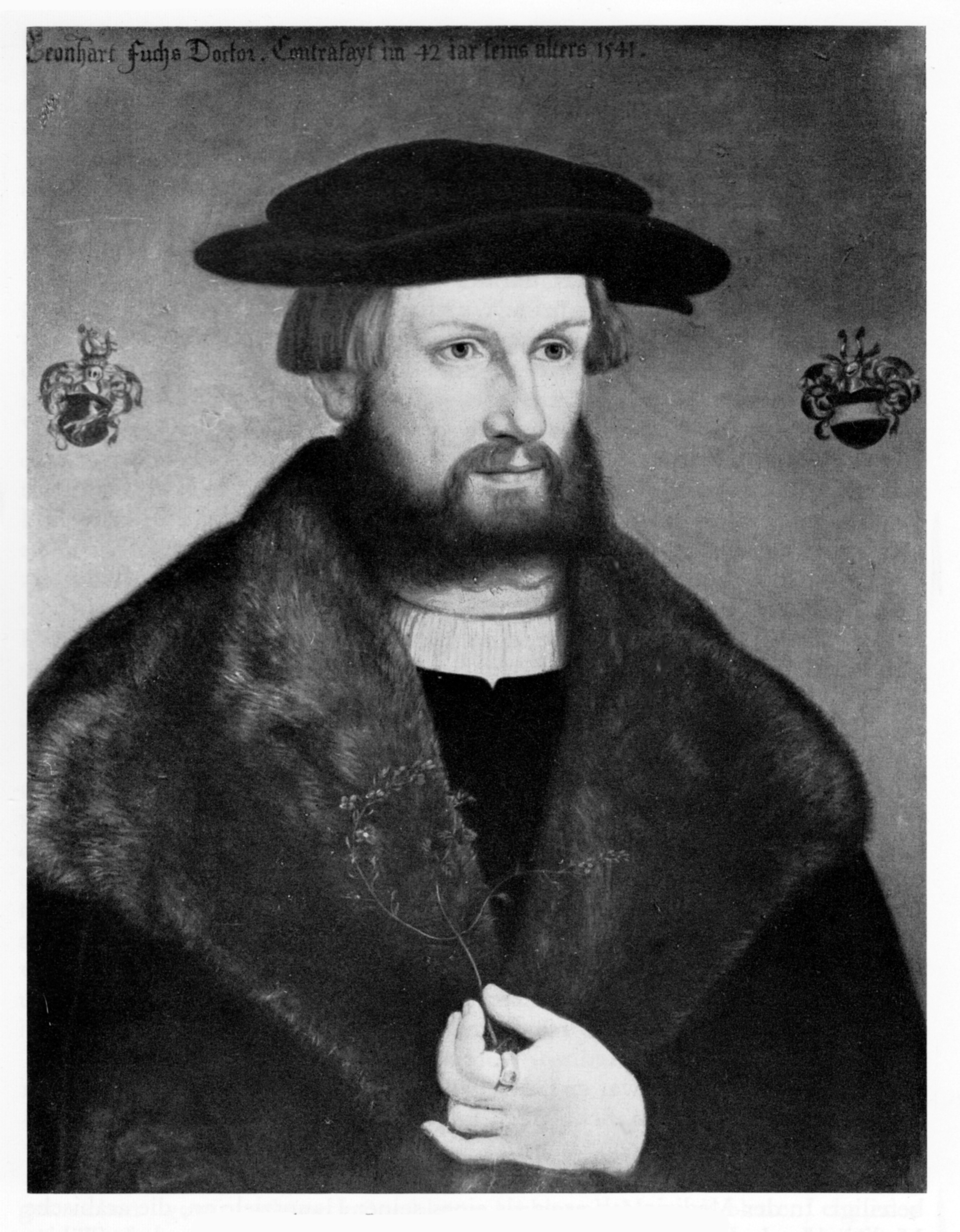 Portrait Leonhard Fuchs